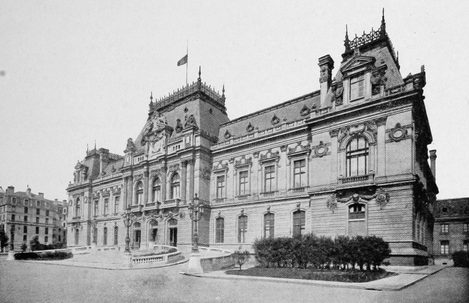 Dictionnaire illustré des communes du département du Rhône. Tome 2 / par MM. E. de Rolland et D. Clouzet.